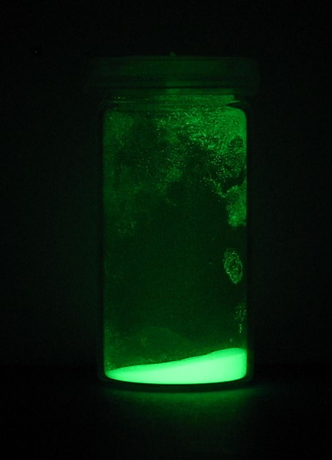 Phosphoreszierende Pigmente (ZnS)